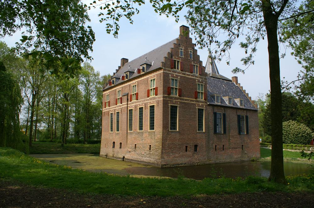 Kasteel Wijenburg of 't Huis te Echteld te Echteld.